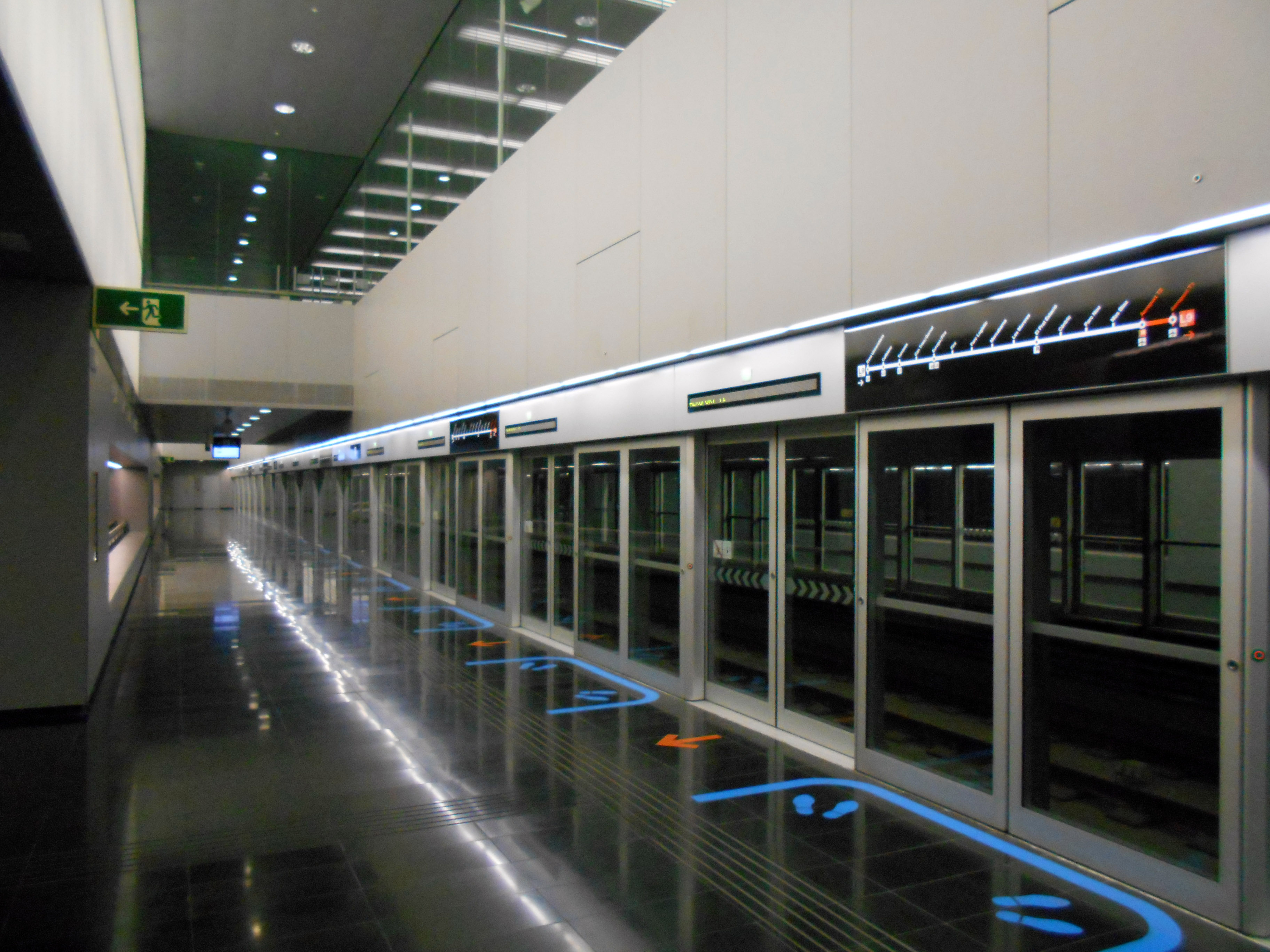 Estación Aeroport T2.